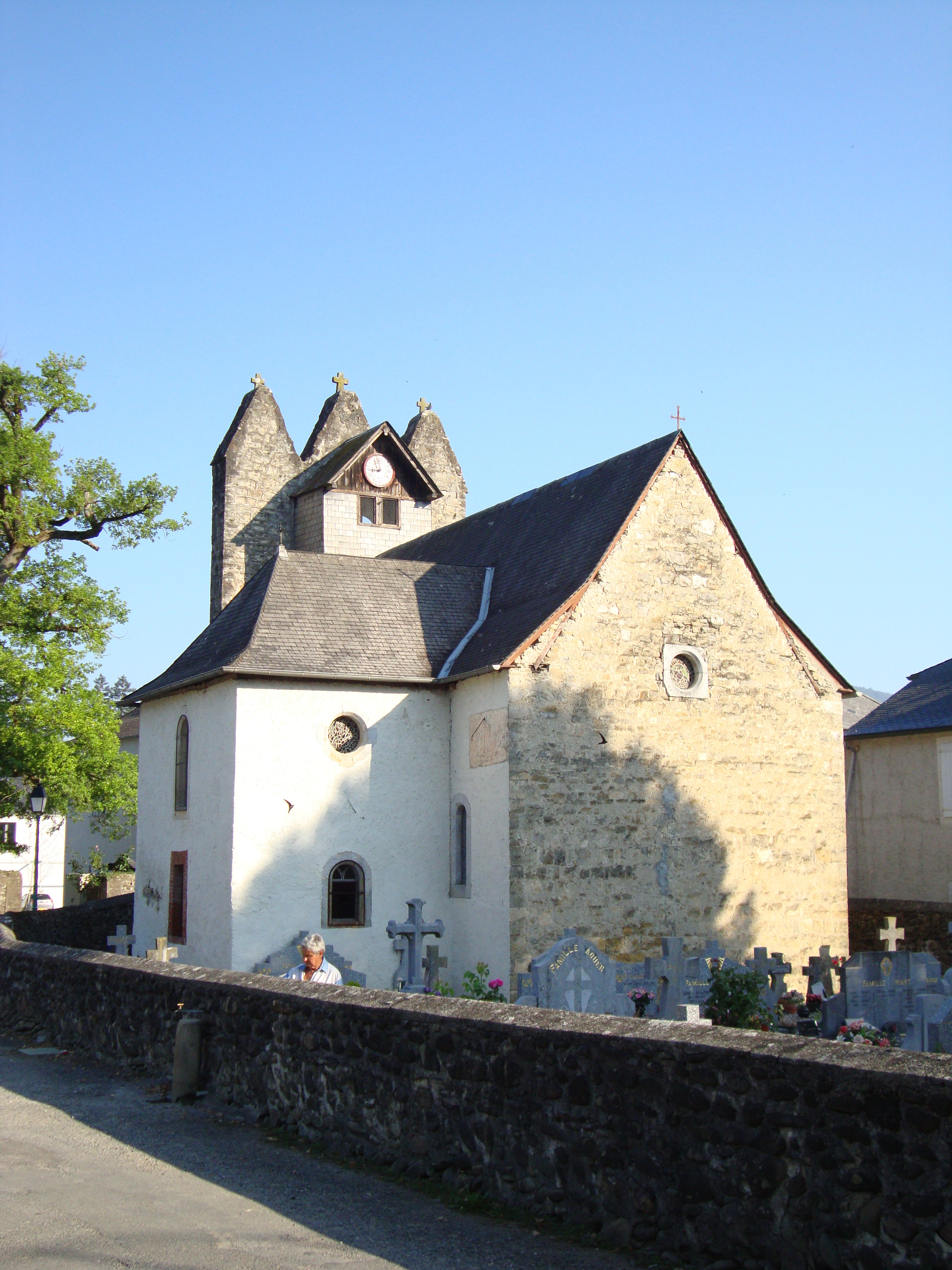 Libarrenx (Gotein-Libarrenx, Pyr-Atl, Fr) trinitarian church